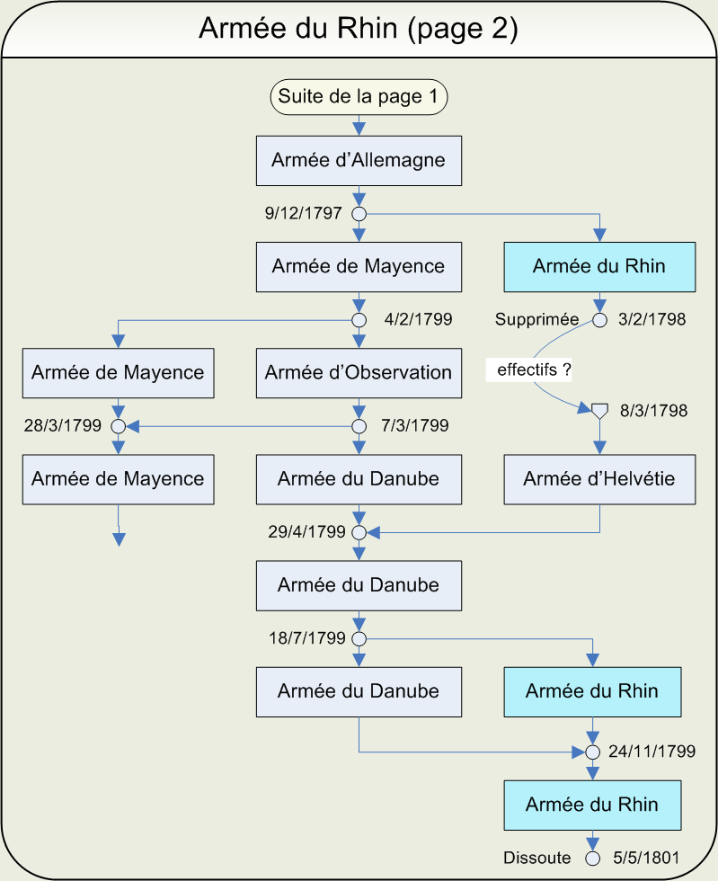 Ordinogramme de l'armée du Rhin (page 2) Dessin réalisé par Papier K